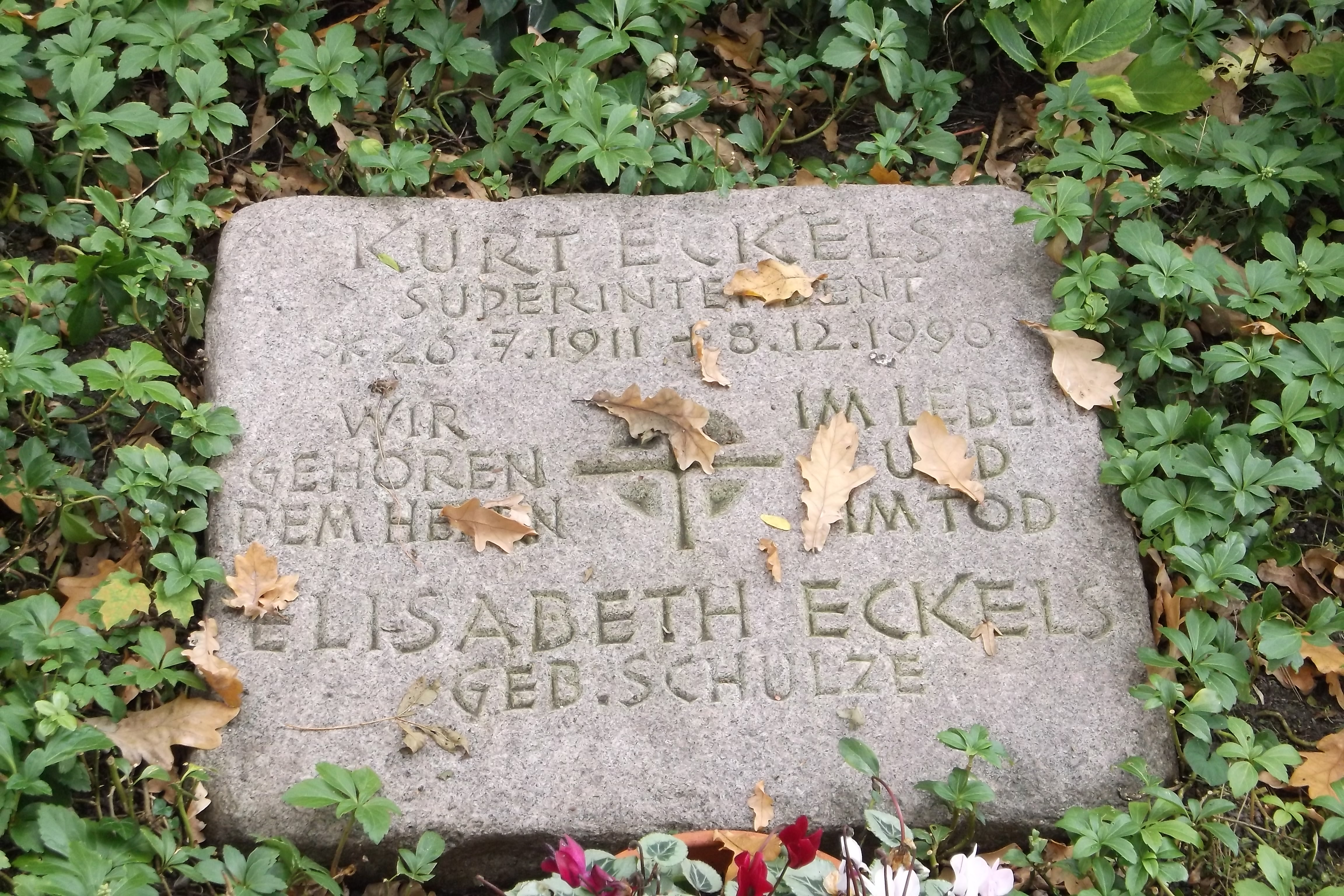 Grabstein Kurt Eckels auf dem Neuenhäuser Friedhof in Celle